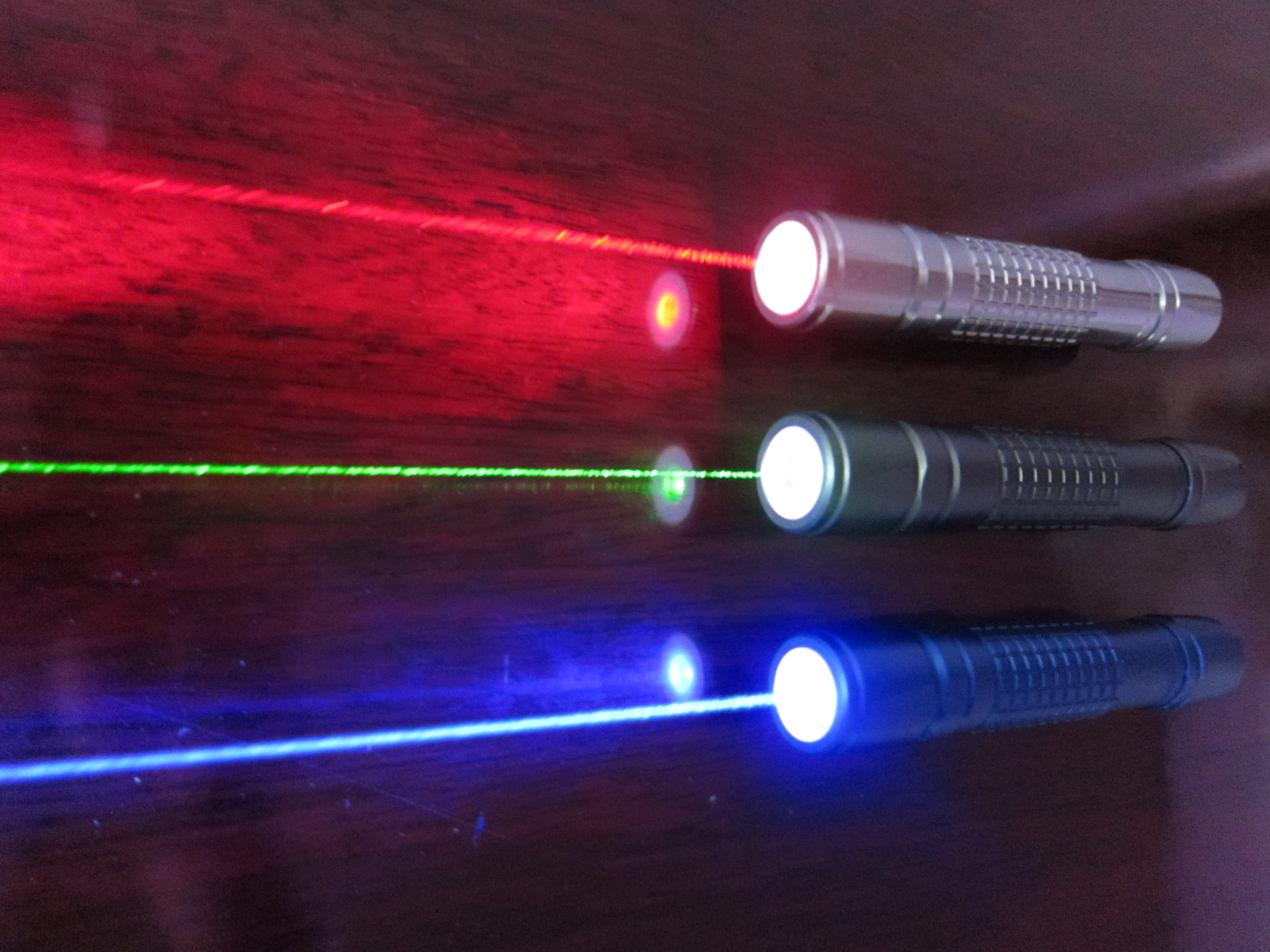 纤绿激光 Q-line Laser 红激光 635nm 绿激光 532nm 蓝激光 445nm